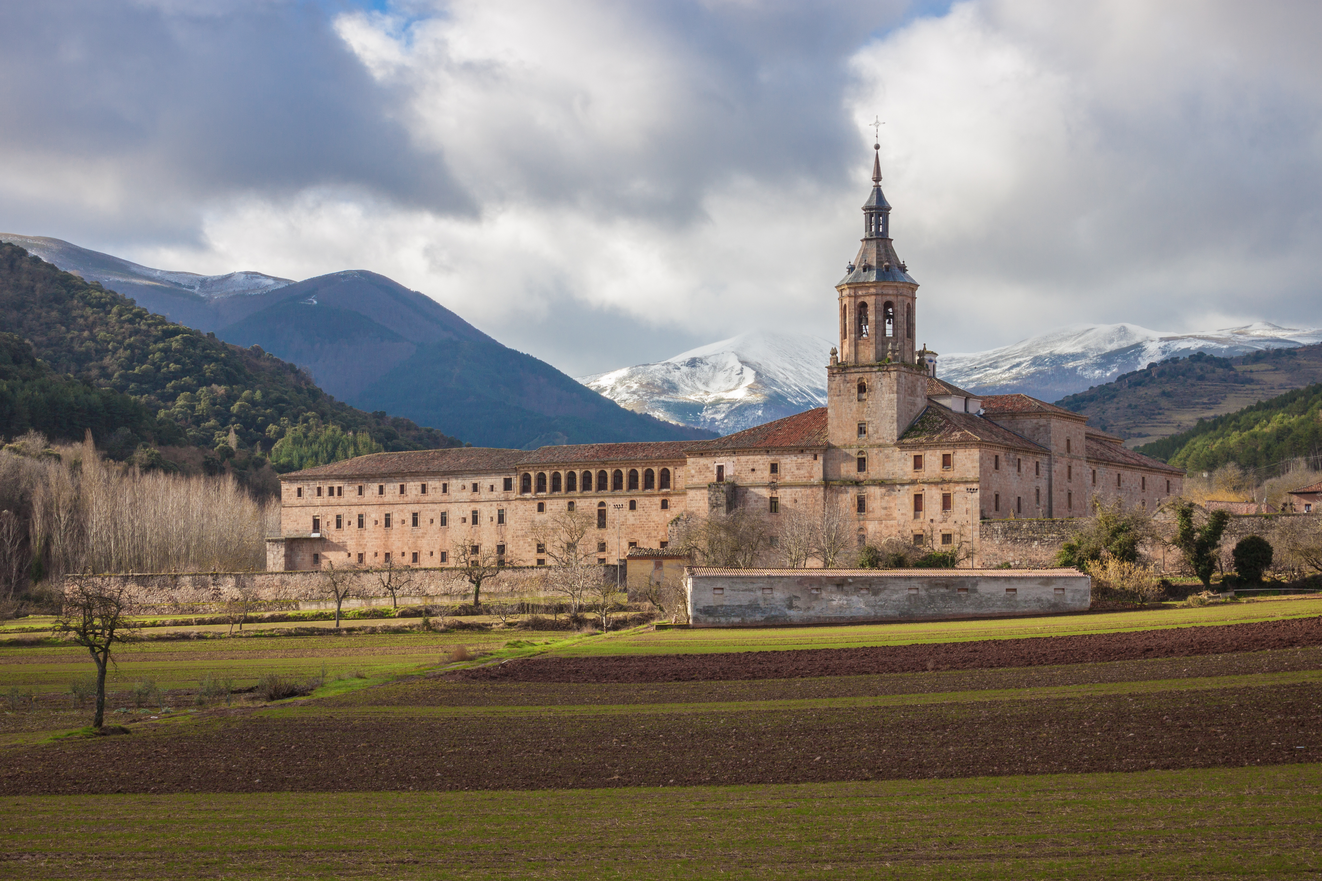 templo donde se encontraron los primeros escritos en español y vasco